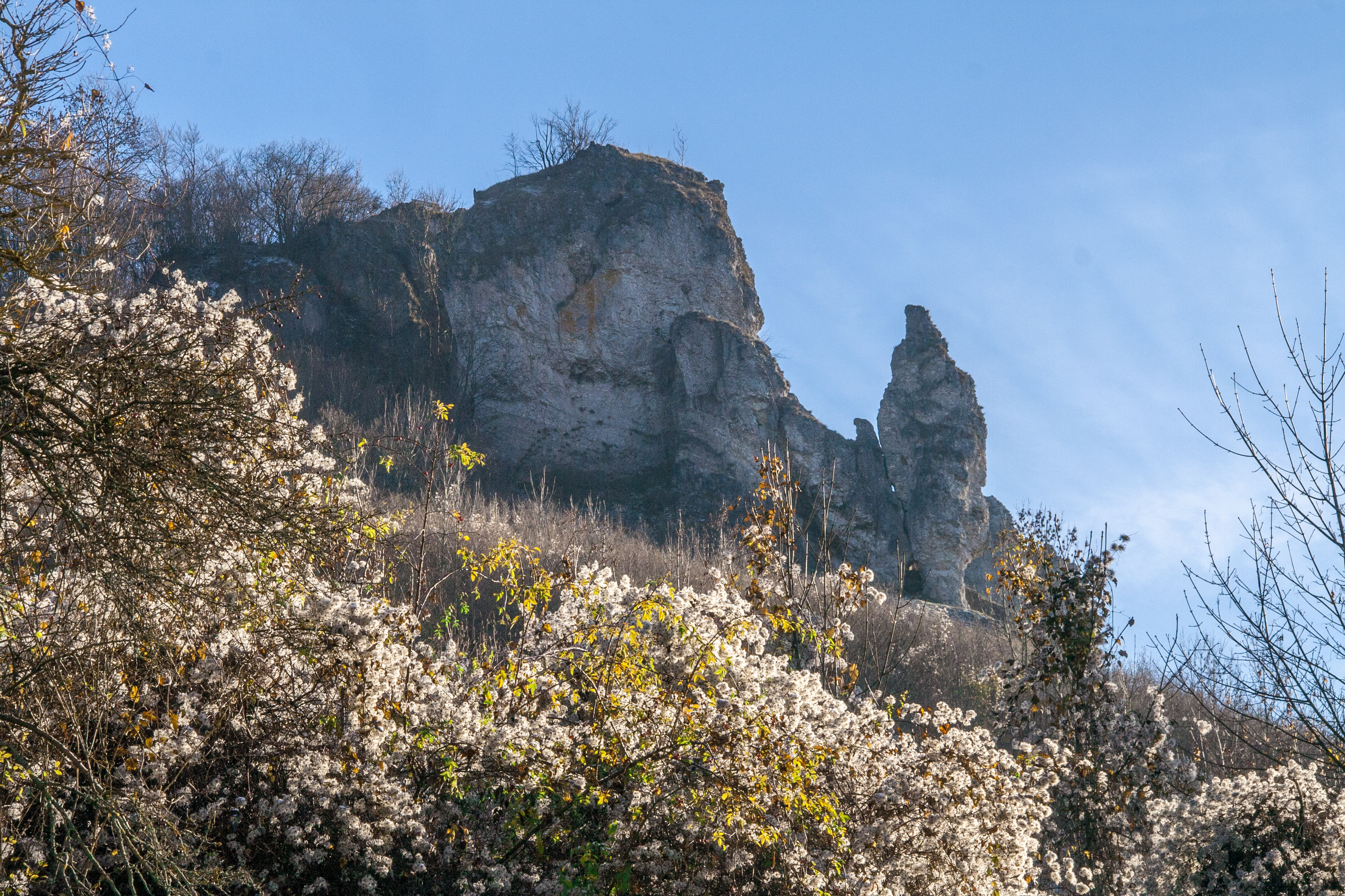 Ehrenbürg, Walberla, Steinerne Frau